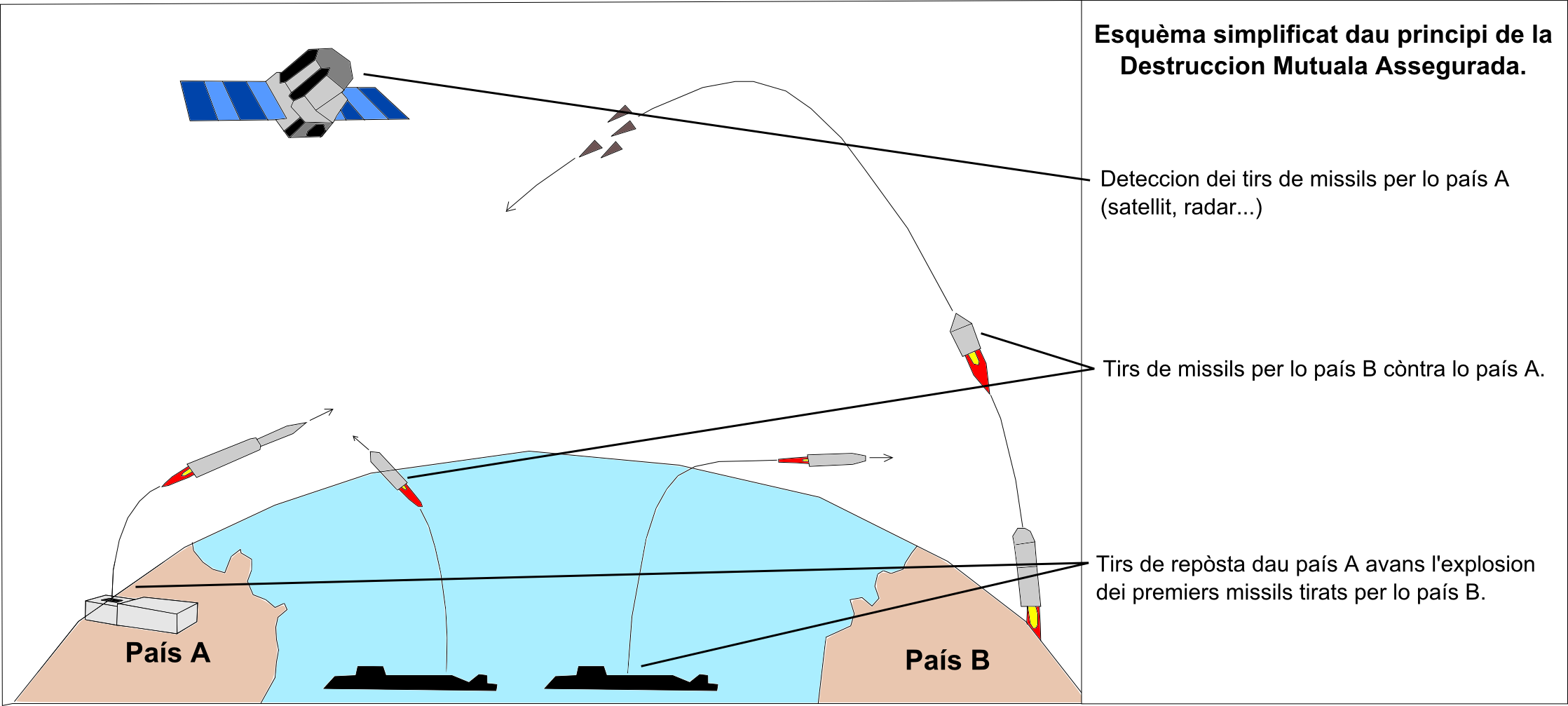 Esquèma simplificat de la Destruccion Mutuala Assegurada.